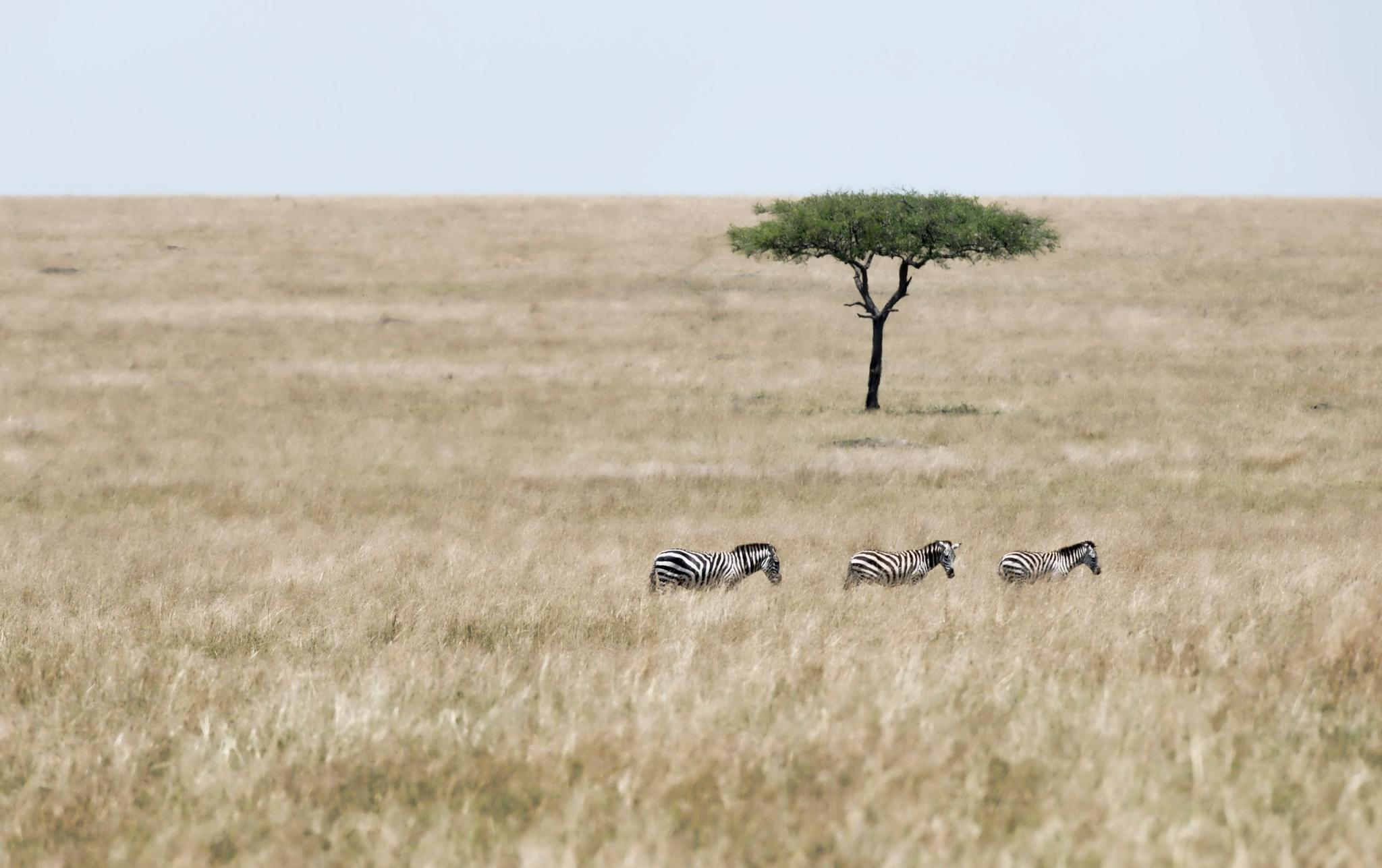 Masai mara